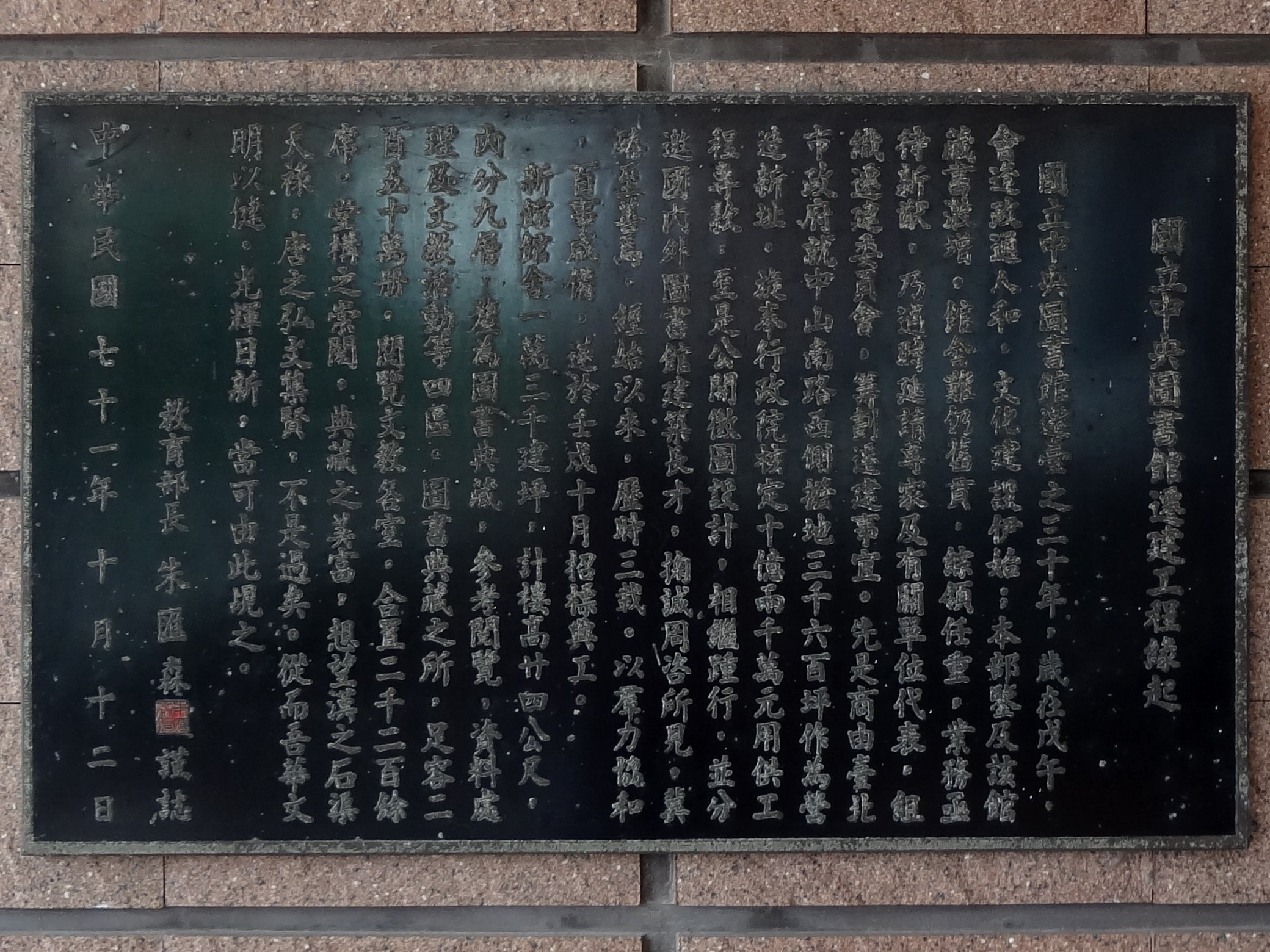 中文（台灣）: 刻於中華民國國家圖書館總館外牆的〈國立中央圖書館遷建工程緣起〉，1982年10月12日撰文，中華民國教育部部長朱匯森署名。